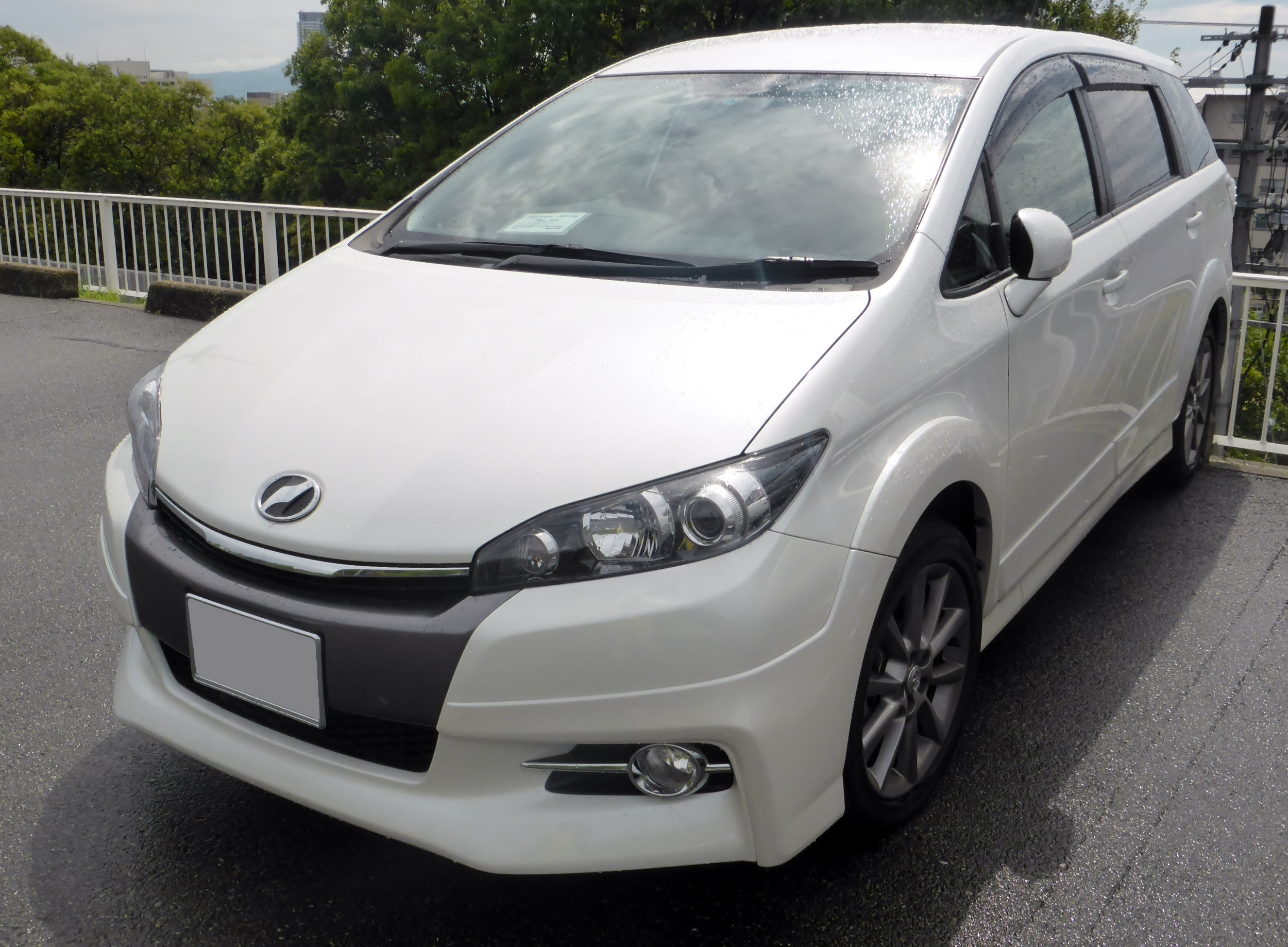 ZGE22W型トヨタ・ウイッシュ2.0Zをフロントから撮影。